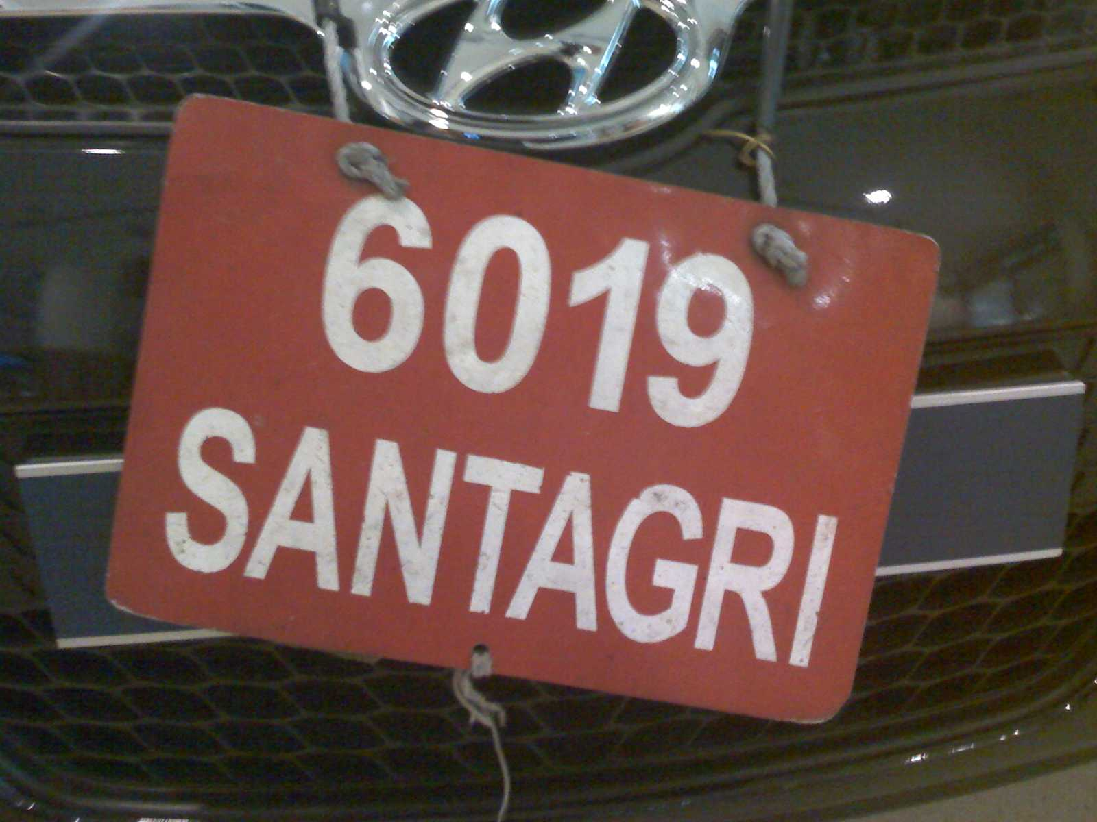 Portugal, dealer trânsit licence plate